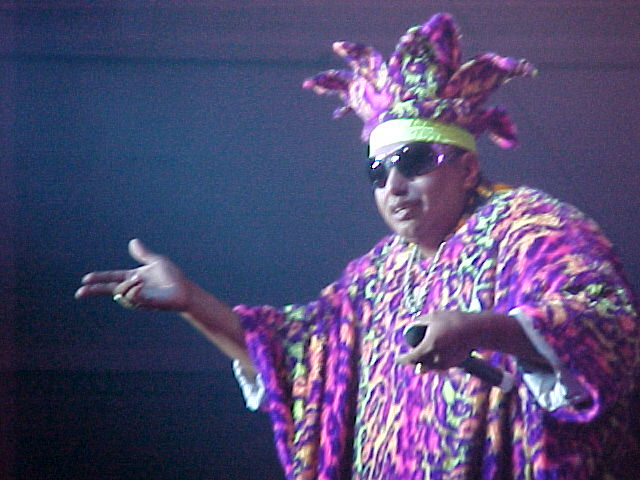 King Africa en Puerto del Rosario